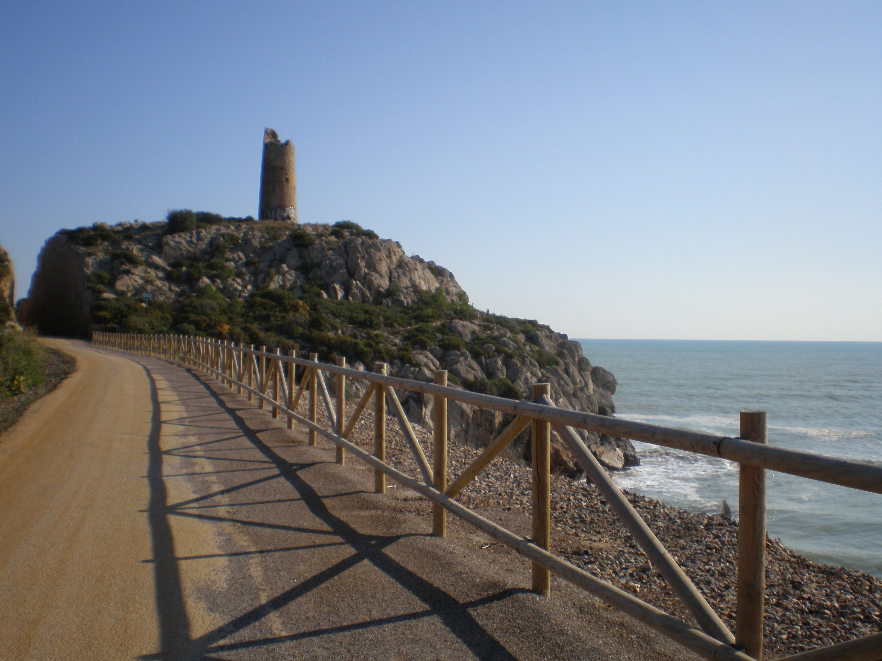 Oropesa del Mar